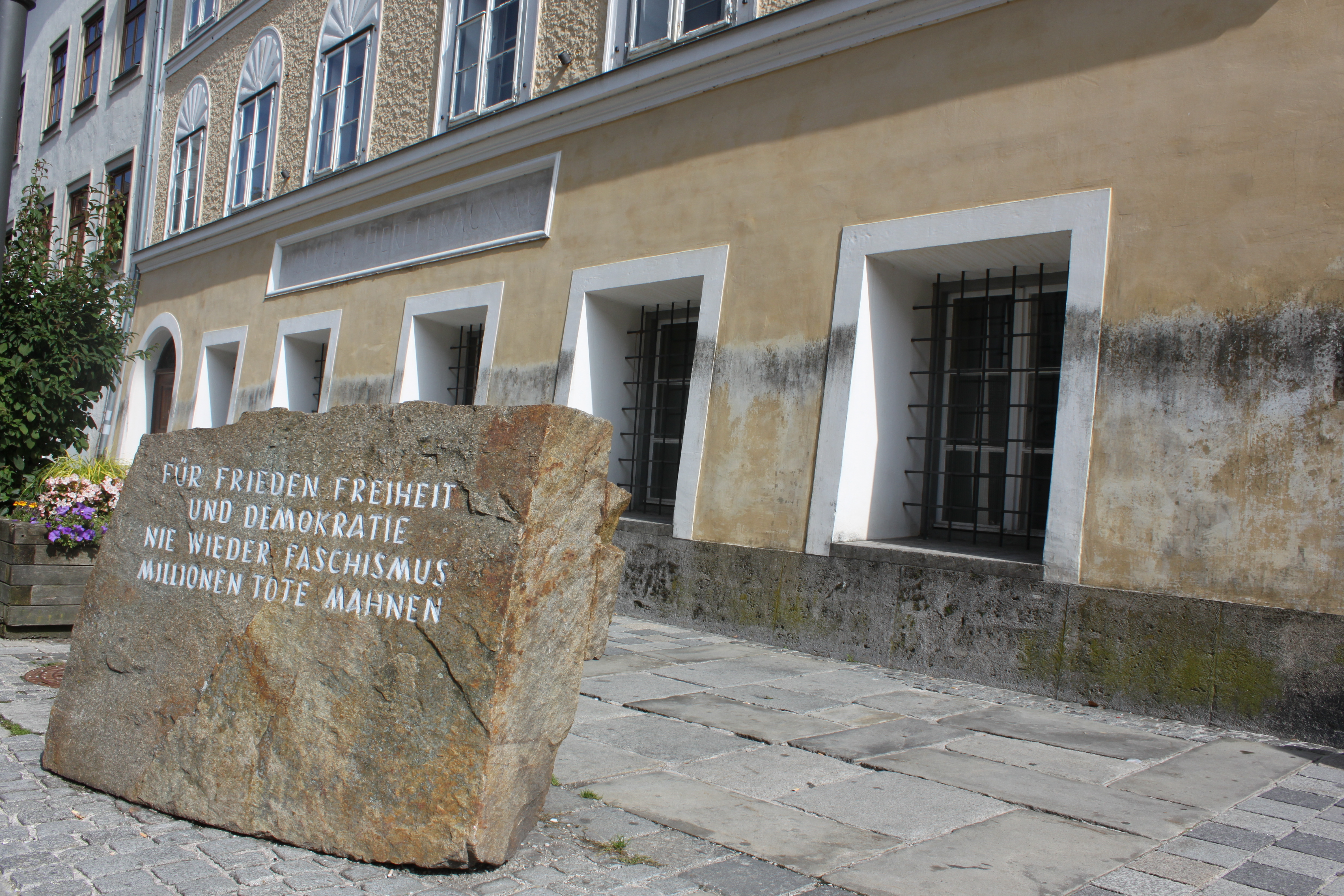 Bürgerhaus, Mahnstein gegen Krieg und Faschismus